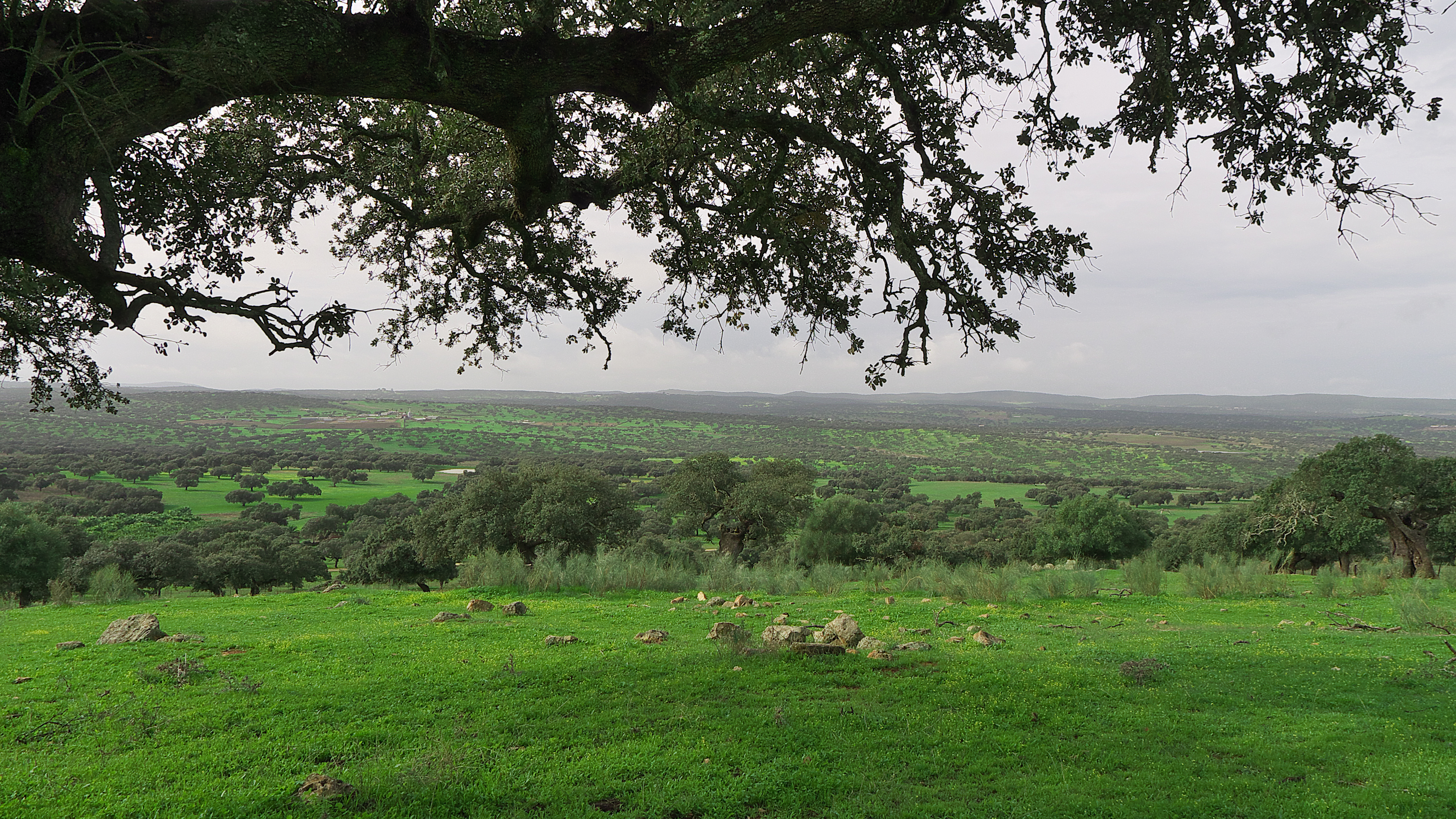 Maravilloso ecosistema